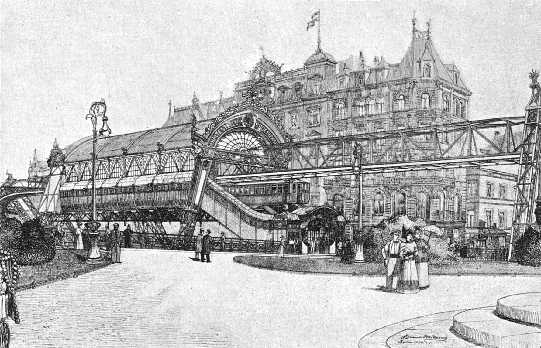 Entwurf der Schwebebahnhaltestelle Döppersberg in Elberfeld (Wuppertal) von Bruno Möhring